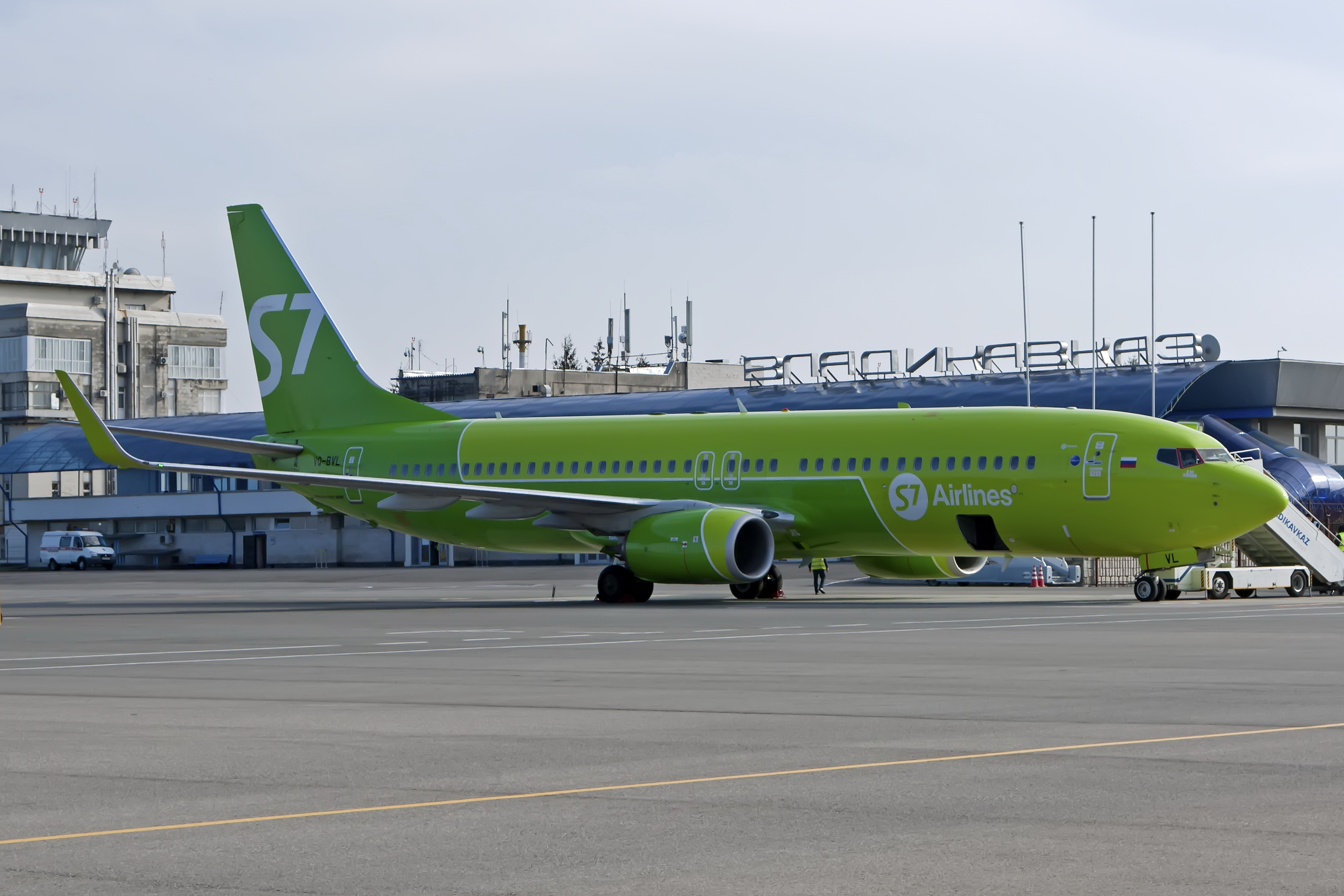 Воздушное судно авиакомпании S7 Airlines на перроне Международного аэропорта "Владикавказ"